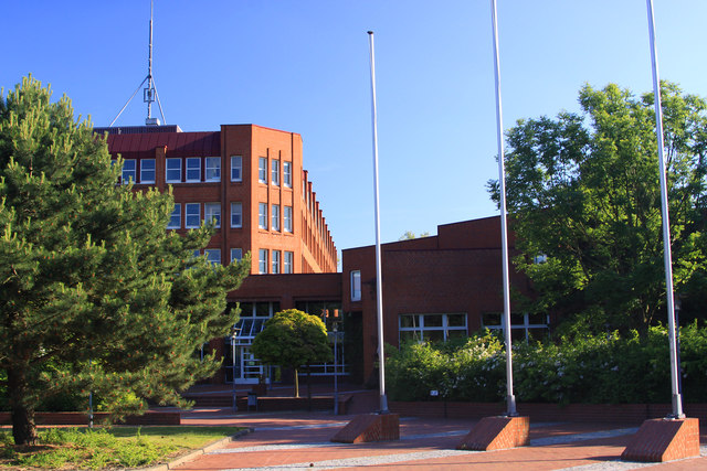 Cuxhaven - Westerwisch